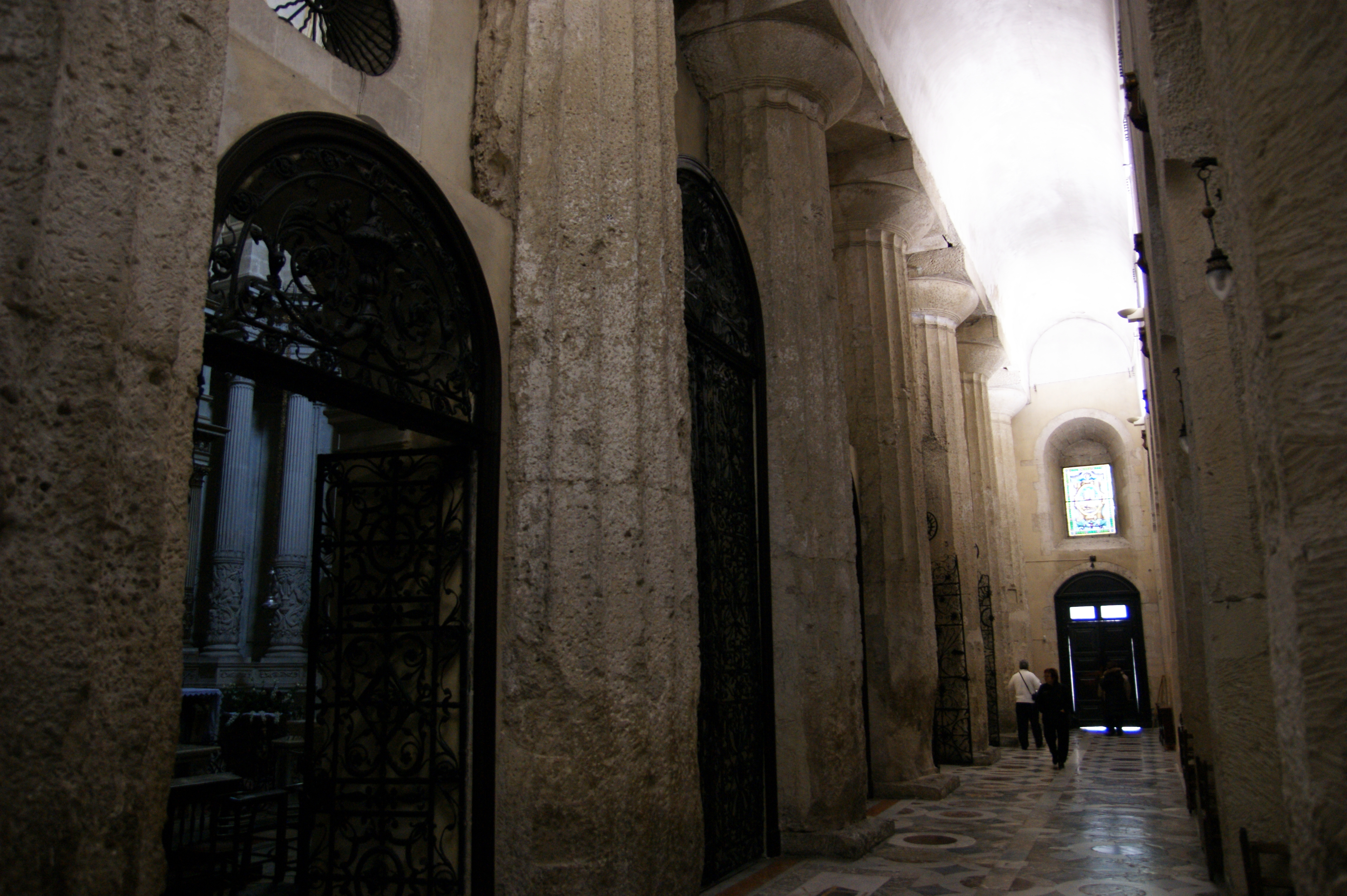 Tempio di Atena - Duomo di Siracusa